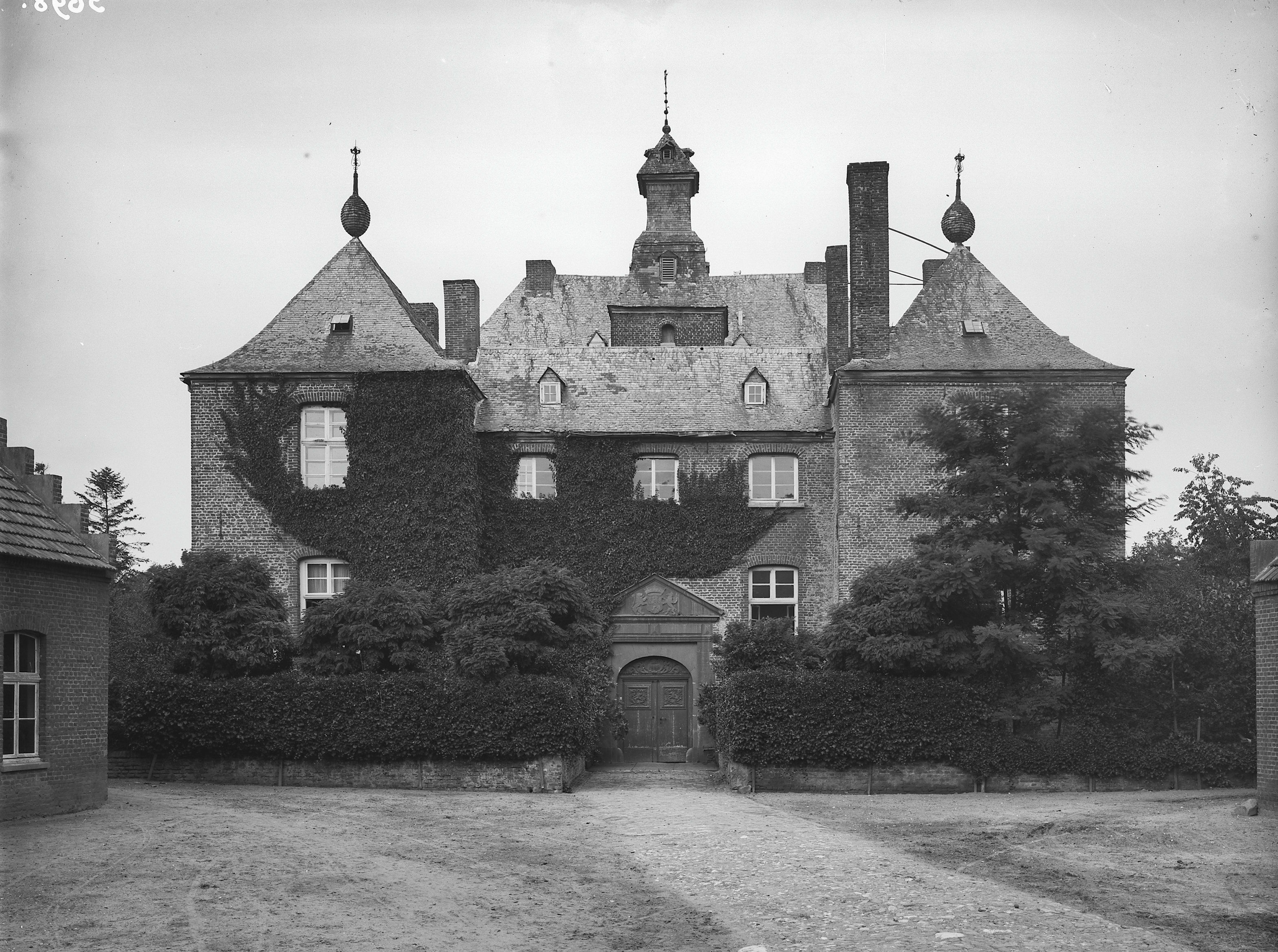 Kasteel Blyenbeek: Voorgevel